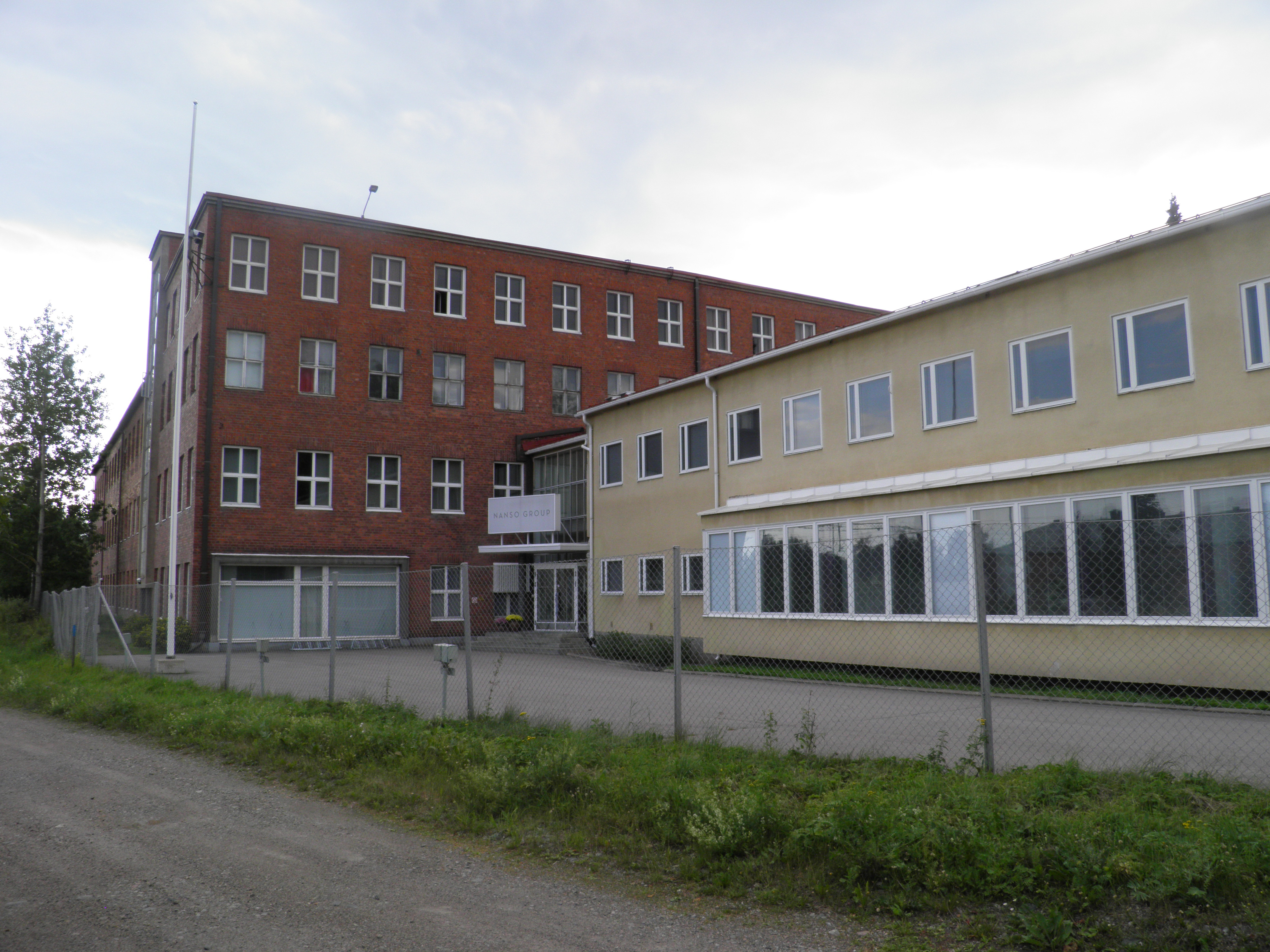 Nanso Groupin pääkonttori Nokialla.